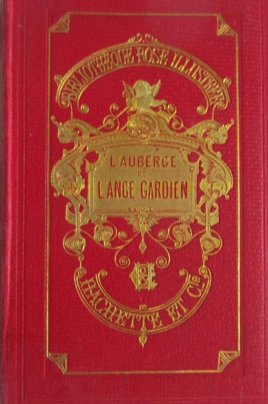 Comtesse de Ségur, L'Auberge de l'Ange gardien (1863), Bibliothèque rose. Édition 1904.